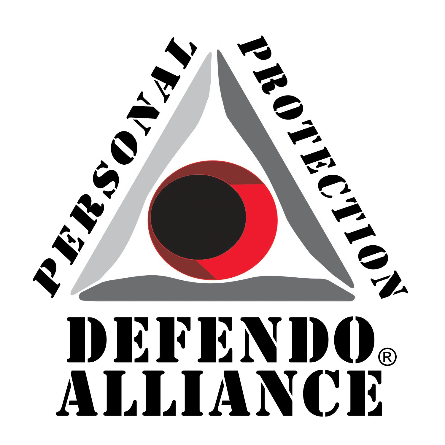 Defendo Alliancen virallinen logo